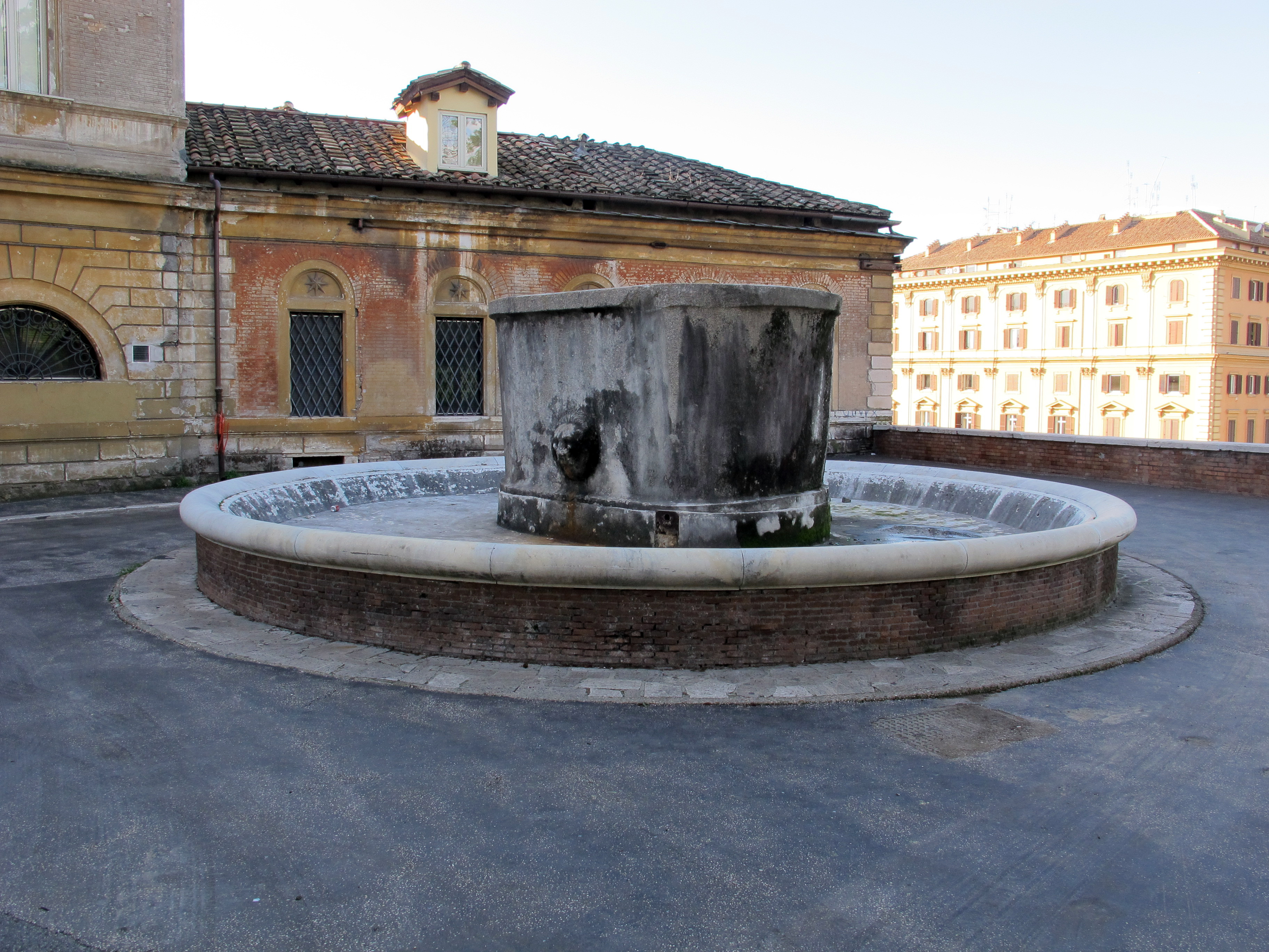 Roma, viale Gabriele D'Annunzio al Pincio. Fontana già in piazza S. Marco, trasferita qui da Pio IX.